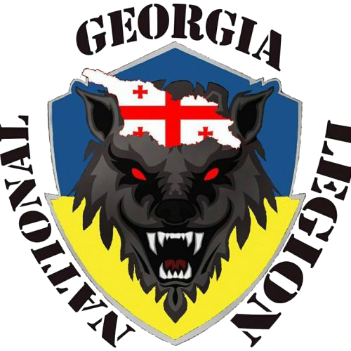 Емблема Національного Грузинського Легіону у складі українських ЗС